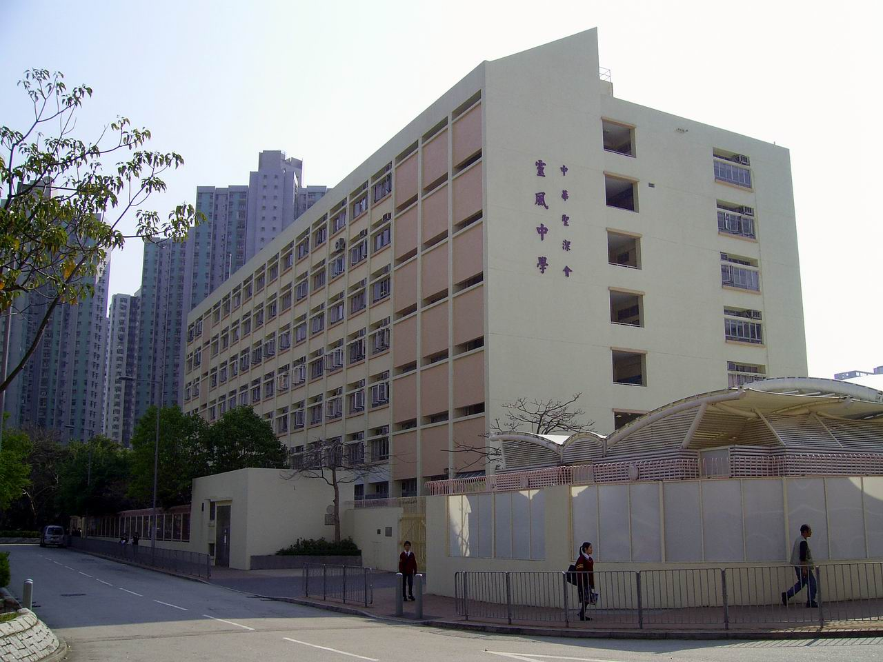 中華聖潔會靈風中學